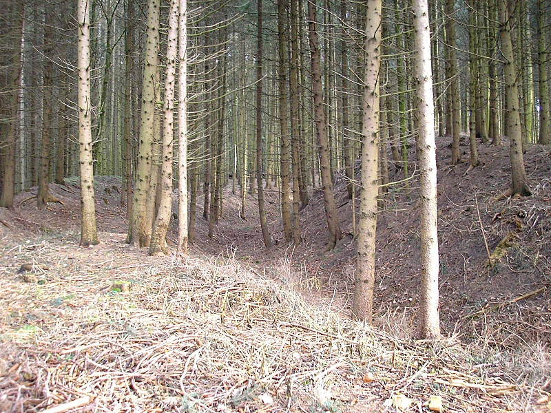 Frühmittelalterlicher Ringwall Walleshausen (Gemeinde Geltendorf, Landkreis Landsberg am Lech, Oberbayern). Das nördliche Vorwerk und der Hauptwall (rechts). Eigene Aufnahme, Feb. 2008 / Early Middle Ages ringwork castle Walleshausen near Geltendorf (Upper Bavaria, Germany). The northern bailey and the central earthworks (right). Own photo, Feb. 2008